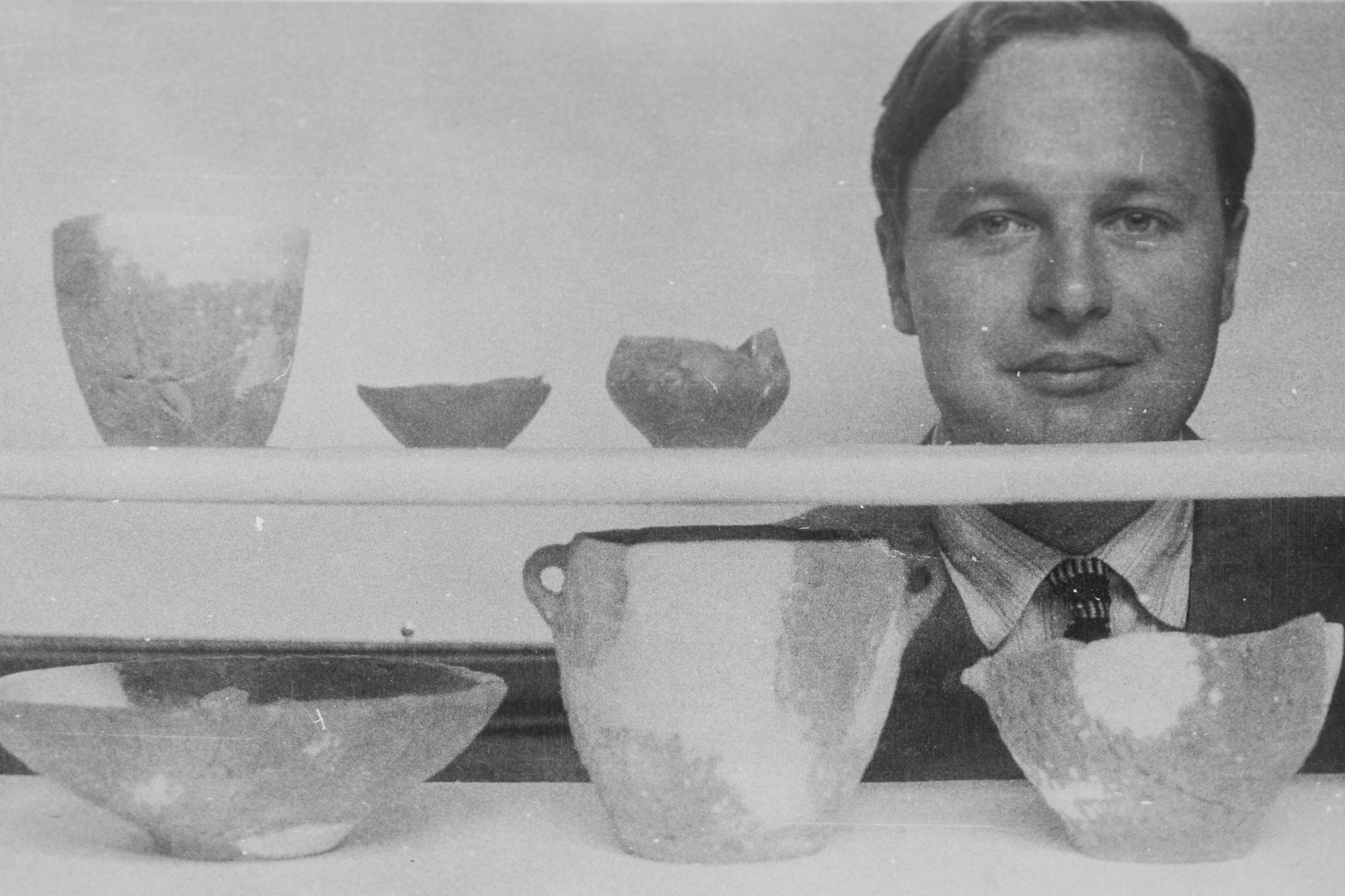 Prof dr hab Tadeusz Malinowski, polski naukowiec, archeolog, z eksponatami archeologicznymi